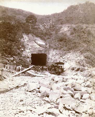 Túnel Velho, aproximadamente 1893/1894. Vista tomada da extremidade do túnel correspondente a Copacabana (atual rua Siqueira Campos). O túnel (atualmente denominado Alaor Prata) atravessa a extremidade do morro de São João, e foi aberto em 1891, para possibilitar a ligação por trilhos entre o centro do Rio de Janeiro e o bairro de Copacabana. Foto de Juan Gutierrez. Galeria do Museu Histórico Nacional.